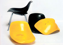 Scobalitbol